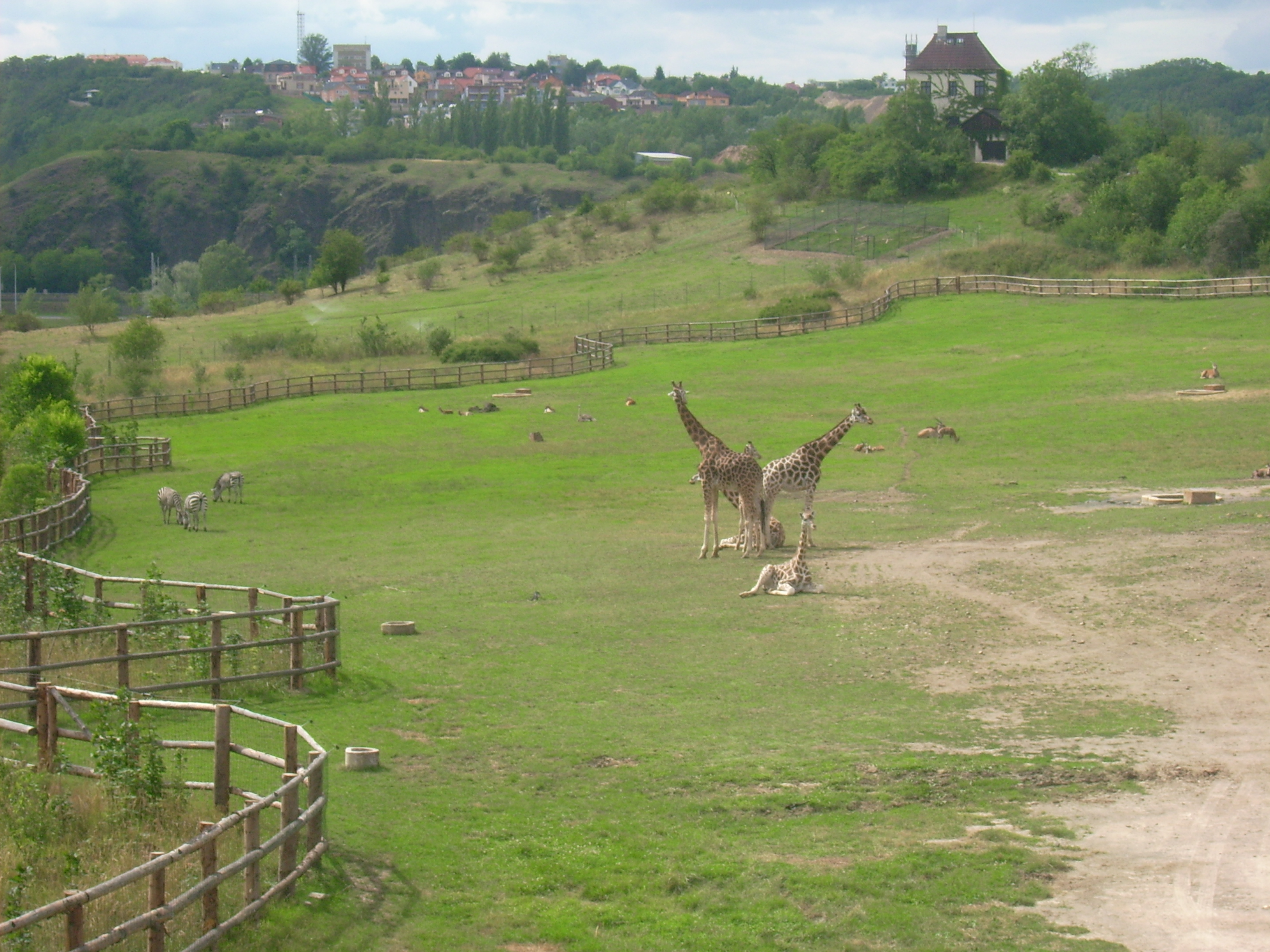 Afrika Anlage im Zoo Prag